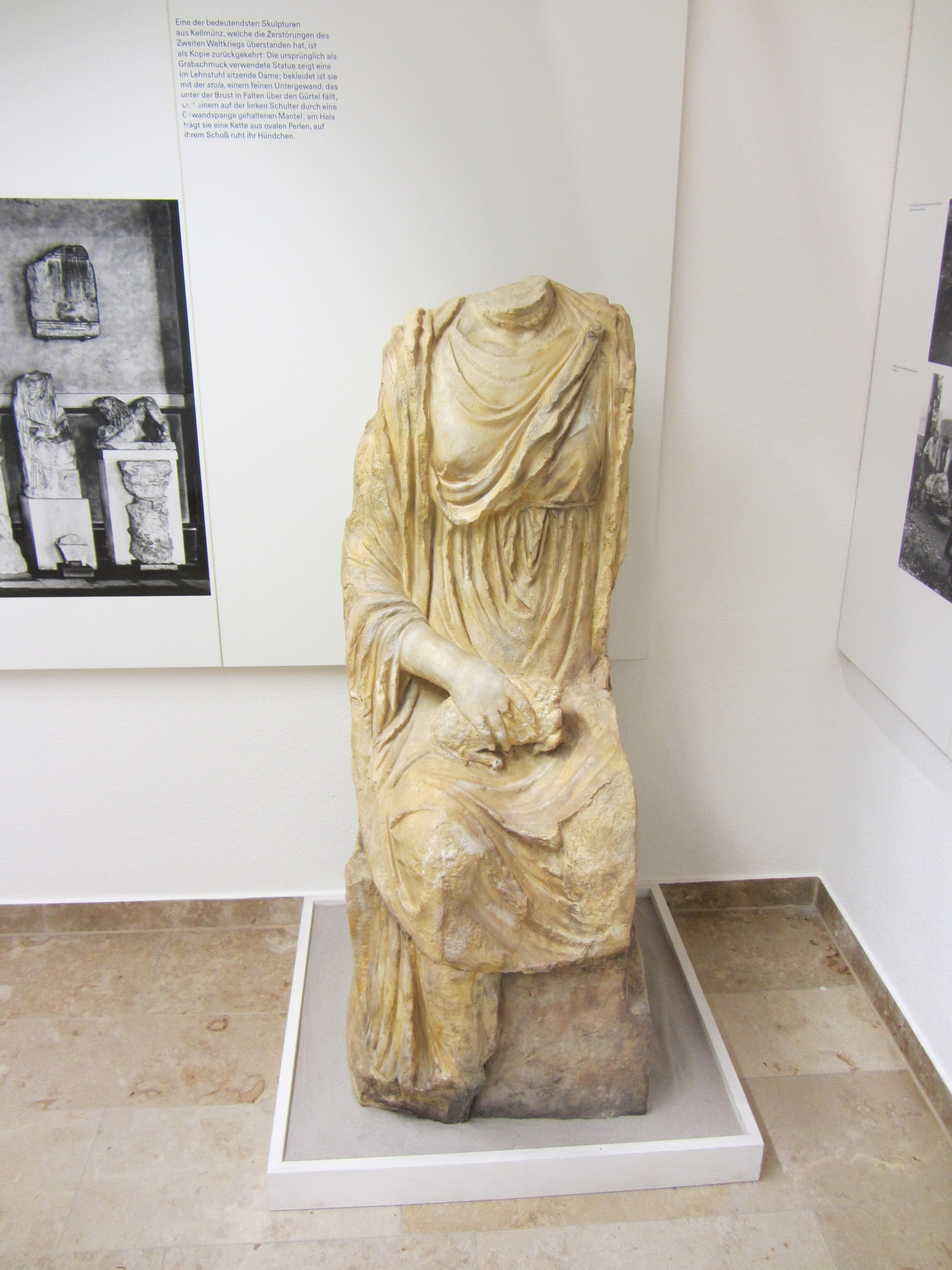 Archäologische Park Kellmünz - Sitzende Frau mit Hund (Kopie der Statue)